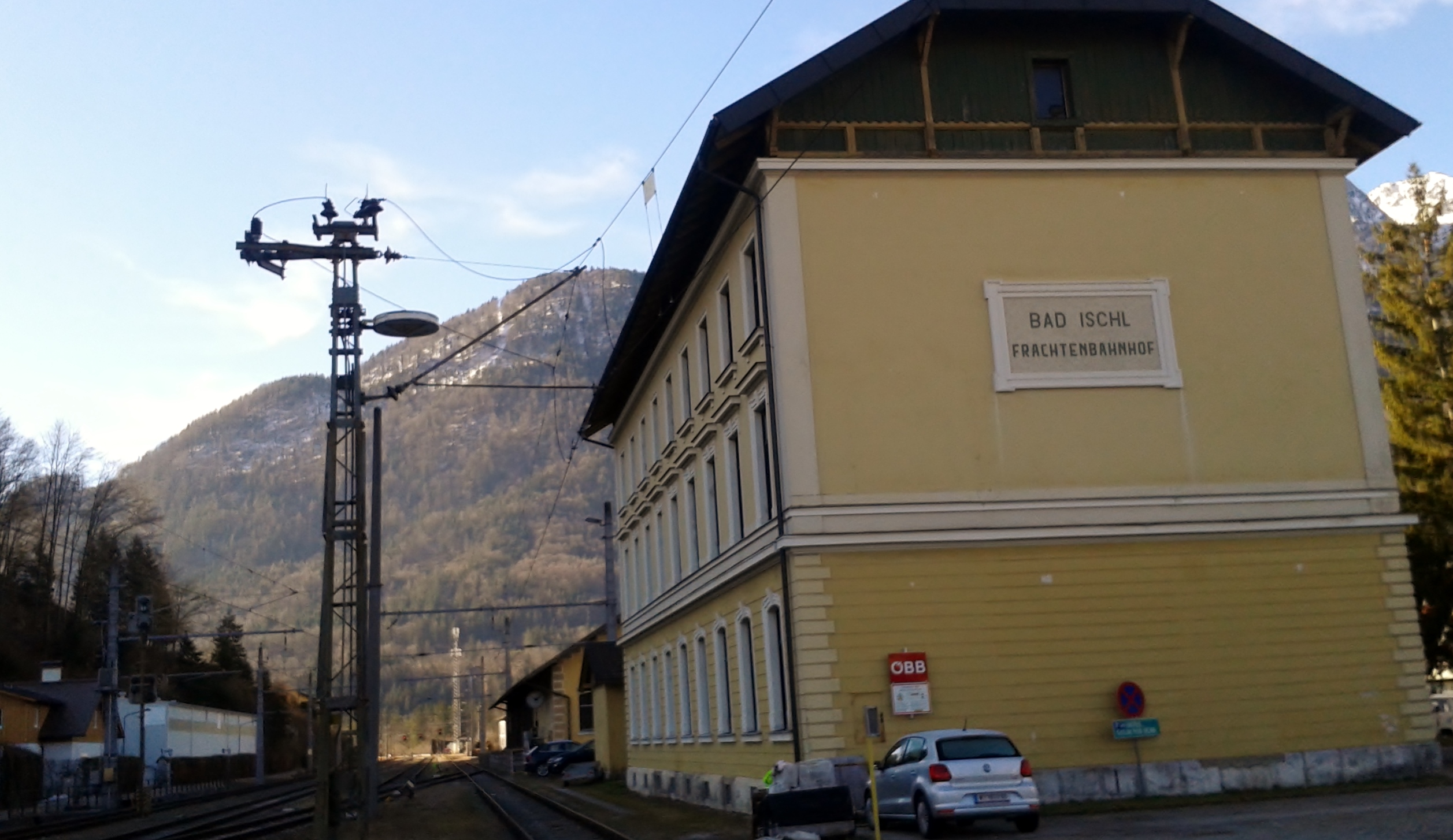 Der Frachtenbahnhof Bad Ischl an der Salzkammergut-Bahn